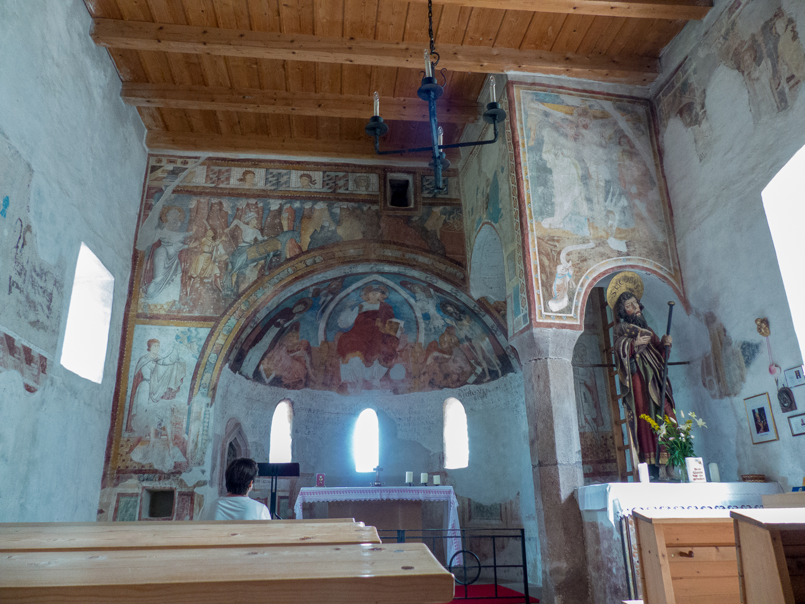 Fresken, Affreschi, Fresques, Frescoes, 12. Jahrhundert in Sankt Jakob, Grissian, Jakobsweg zwischen Meran und Bozen, Südtirol, Italien